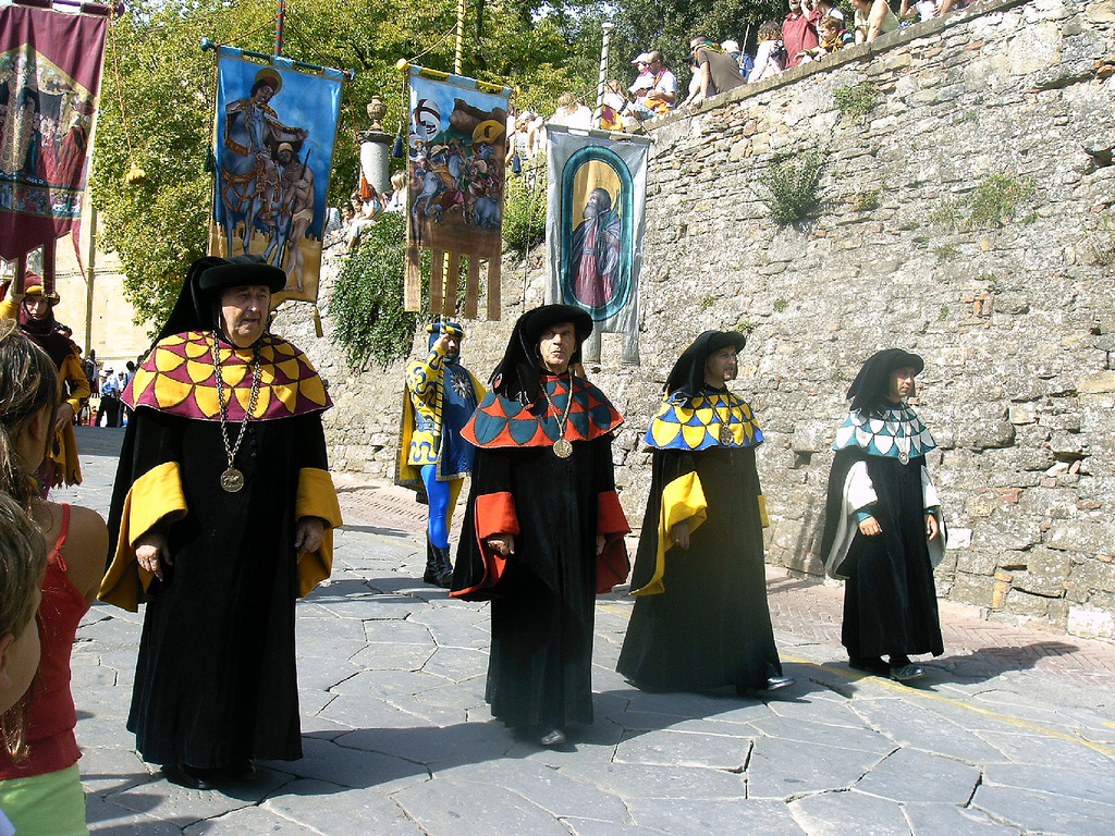 Arezzo, Toscana, ItaliaGiostra di Saraceno Arezzo